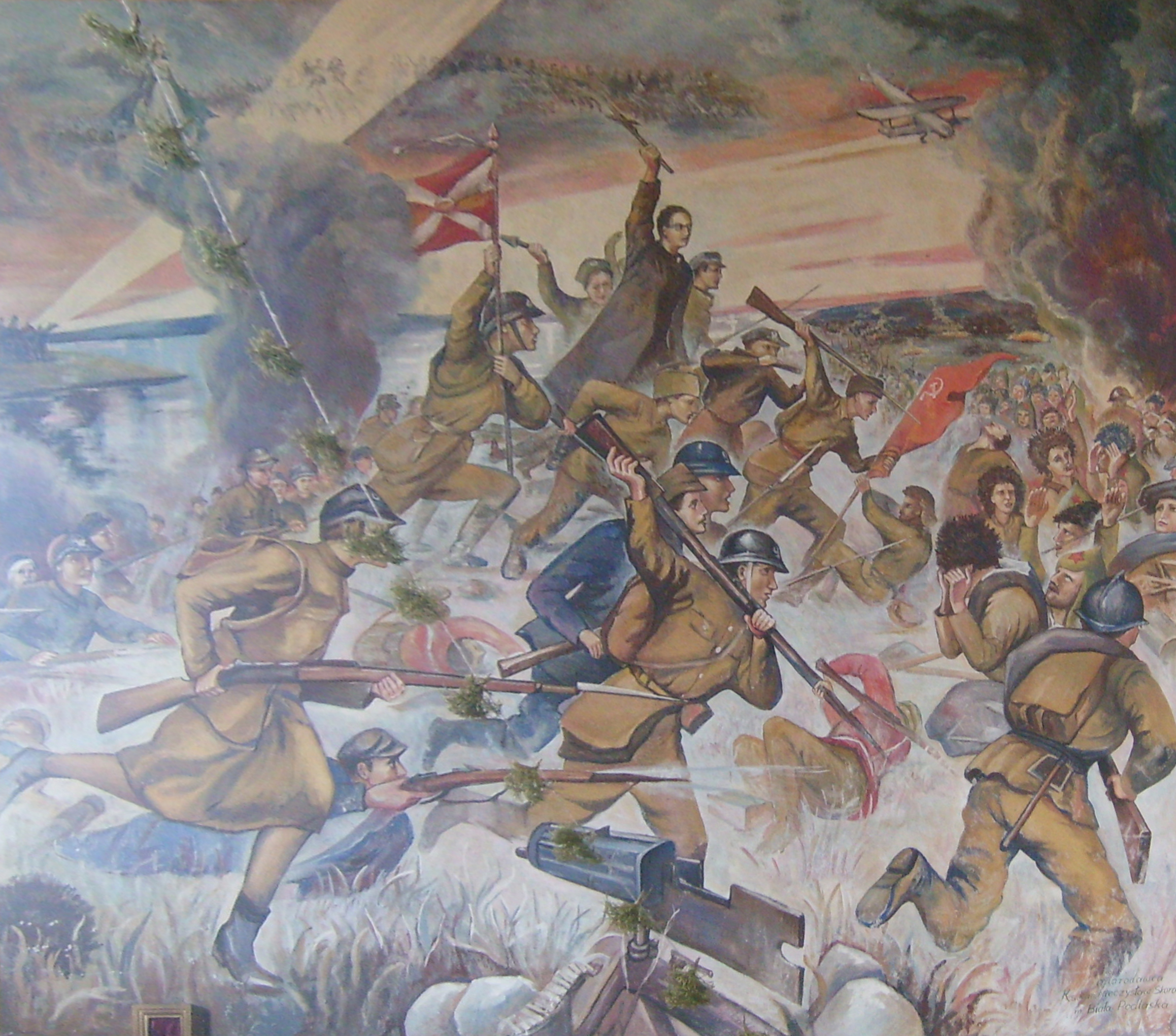 Беларуская (тарашкевіца): Касьцёл Маці Божай Ружанцовай. в. Солы This is a photo of Belarusian heritage monument. Reference number: 412Г000713 ( WLM)